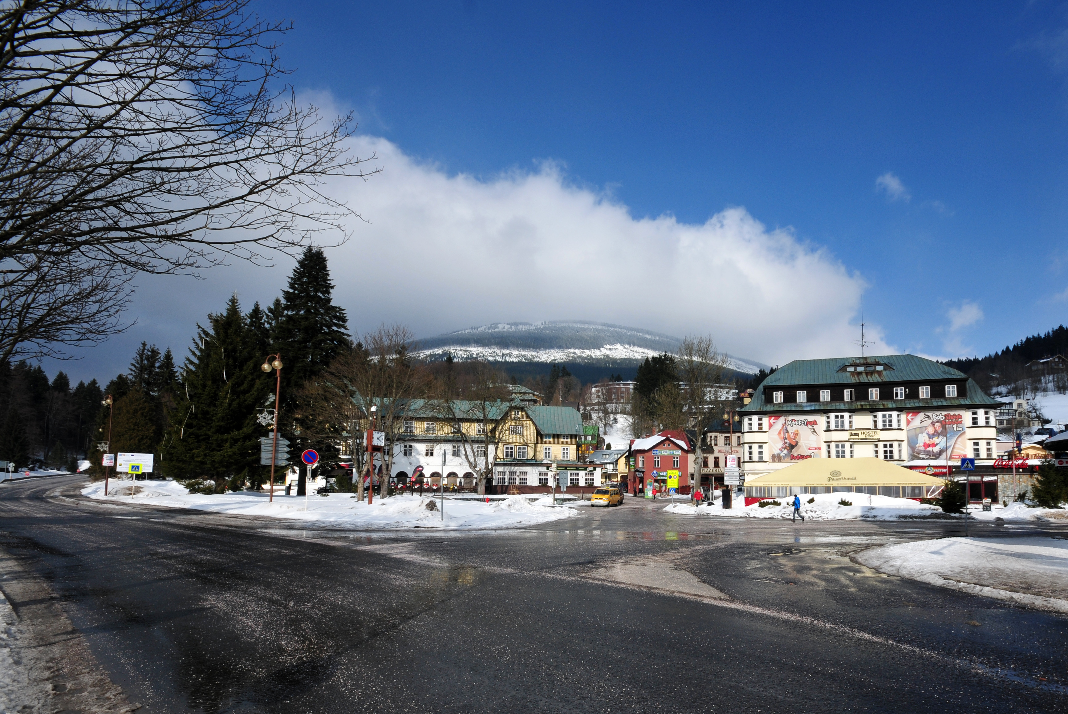 Česky: Špindlerův Mlýn